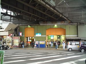 JR鶴橋駅北側から、南向きに撮影。